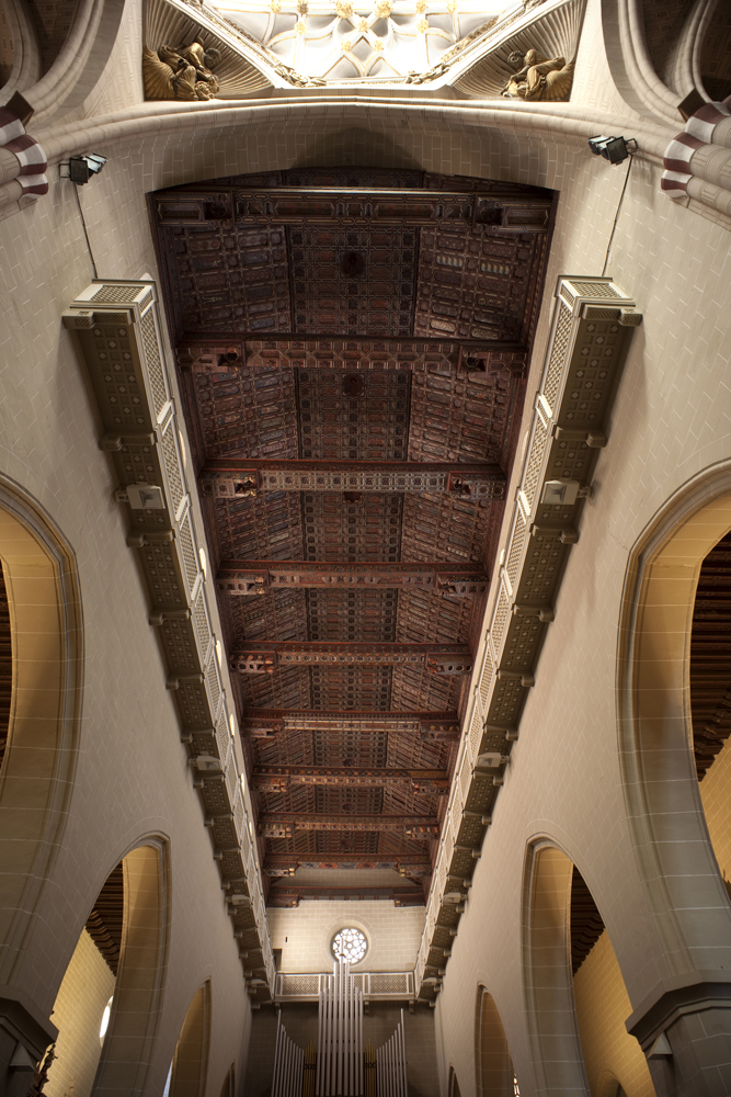 unidentified Cultural Heritage Spain